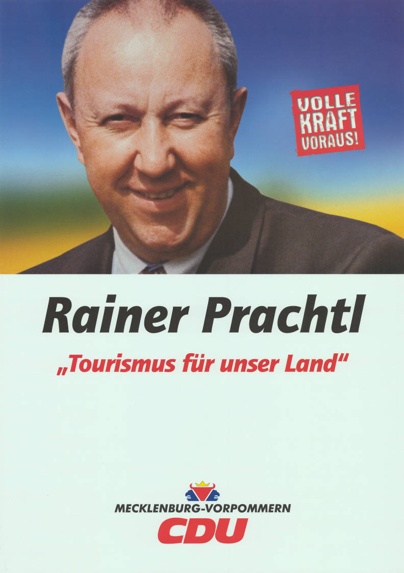 Volle Kraft voraus! Rainer Prachtl "Tourismus für unser Land" Mecklenburg-Vorpommern CDUAbbildung:PorträtfotoPlakatart:Kandidaten-/Personenplakat mit PorträtAuftraggeber:CDU Mecklenburg-VorpommernObjekt-Signatur:10-034 : 303Bestand:Landtagswahlplakate Mecklenburg-Vorpommern (10-034)GliederungBestand10-18:Landtagswahlplakate Mecklenburg-Vorpommern (10-034) » CDULizenz:KAS/ACDP 10-034 : 303 CC-BY-SA 3.0 DE